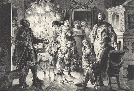 Weihnachtsbild (Aus dem Georg Billers Jagd-Album)